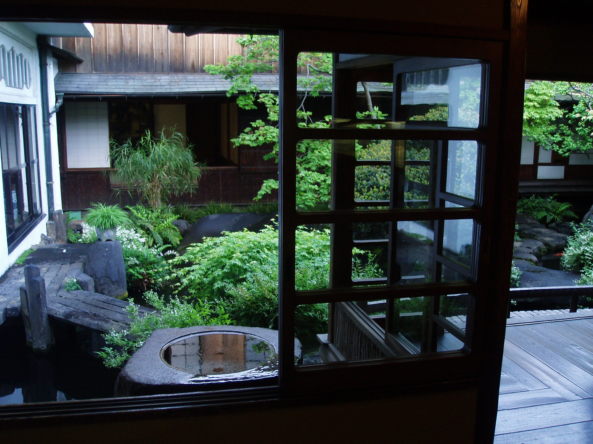 朝倉彫塑館の中庭。